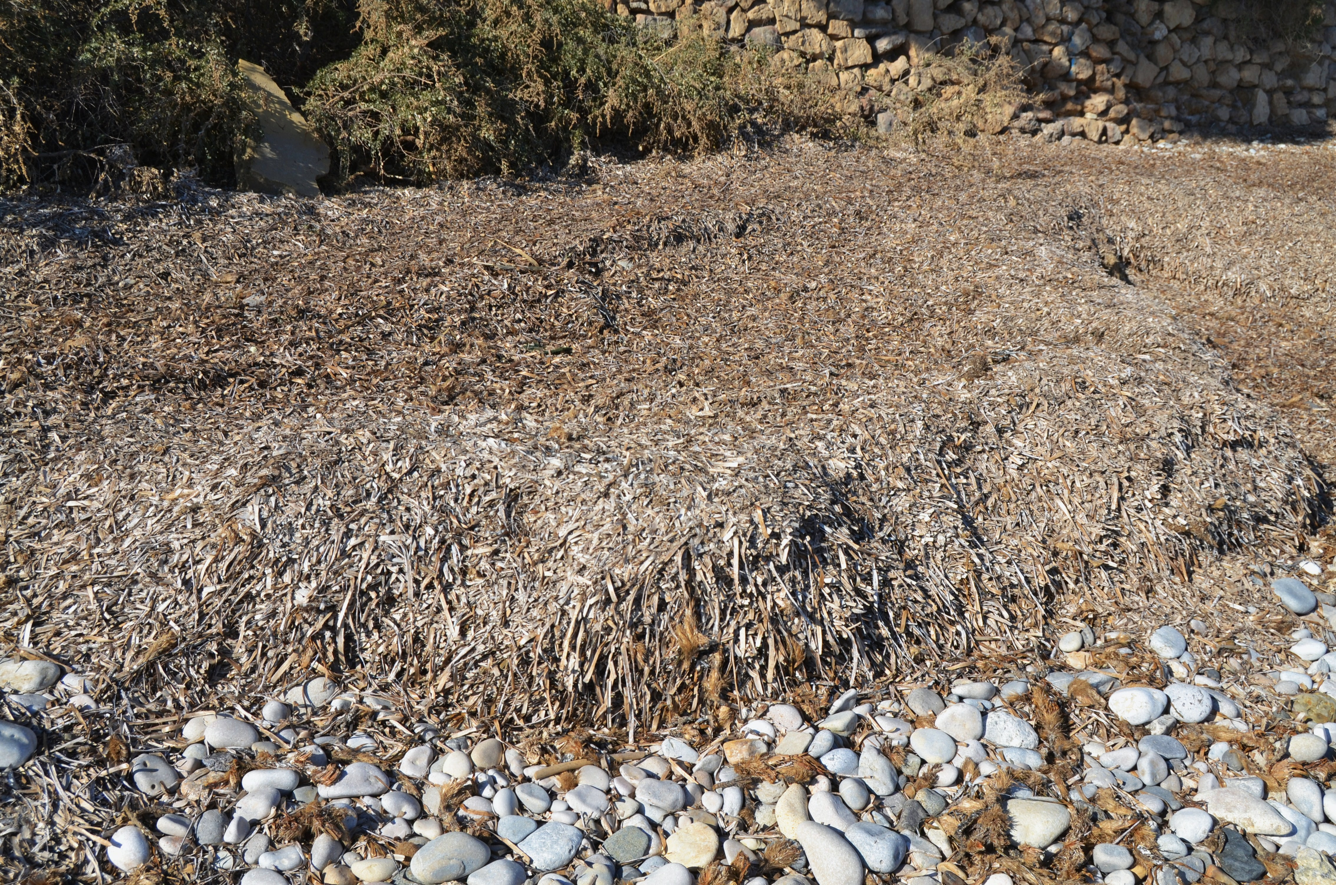 Posidònia seca a la platja de la Solsida, Altea.